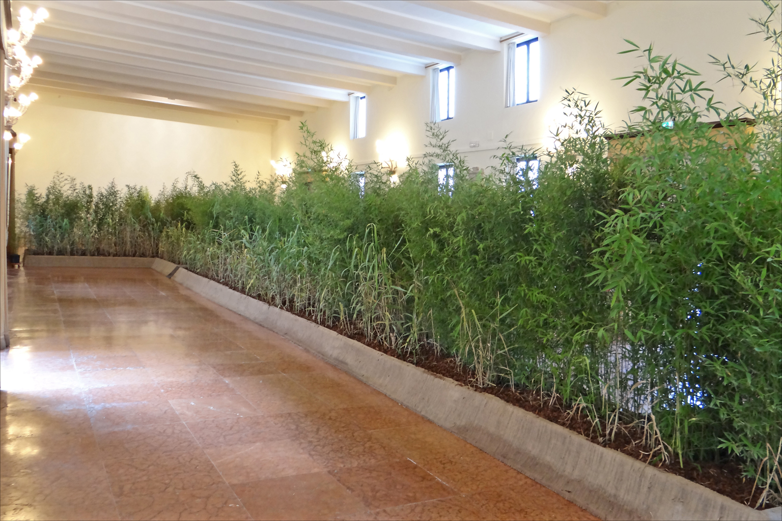 Beyond Entropy Angola / Plantation d'Arundo Donax pour lutter contre la pollution et créer des ressources énergétiques C'est la première participation de l'Angola à la Biennale d'architecture. Le projet urbain présenté a pour but de conjuguer espace public et infrastructure énergétique dans les quartiers défavorisés et surpeuplés de Luanda, la capitale du pays. Des plantations d'une canne à croissance rapide : l'Arundo Donax, ont été faites à Luanda dans des espaces non utilisés entre des maisons. Ces plantations deviennent des jardins communs qui filtrent l'eau polluée et absorbent de grande quantité de gaz carbonique grâce aux propriétés de l'Arundo Donax. De plus, ces plantes constituent des ressources de biomasse. Commissario: Ministero della Cultura della Repubblica dell’Angola. Curatori: Stefano Rabolli Pansera, Paula Nascimiento. Le pavillon est présenté dans les locaux de la Fondation Giorgio Cini, Isola di San Giorgio Maggiore, Venezia Article Wikipedia sur la plante qui en Provence est depuis longtemps connue pour la qualité des anches d'instruments à vent qu'elle permet de fabriquer.